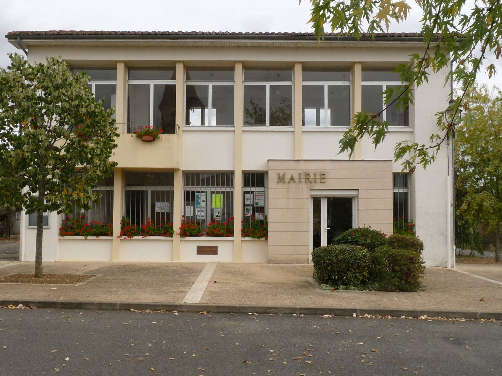 mairie de Pleuville, Charente, France